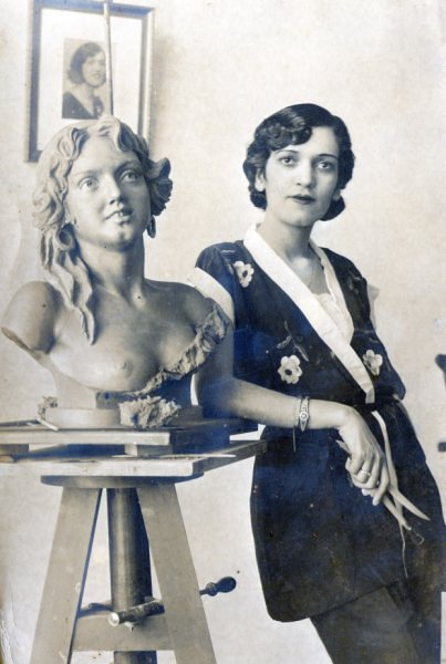 A artista ao lado da obra Busto de Cigana